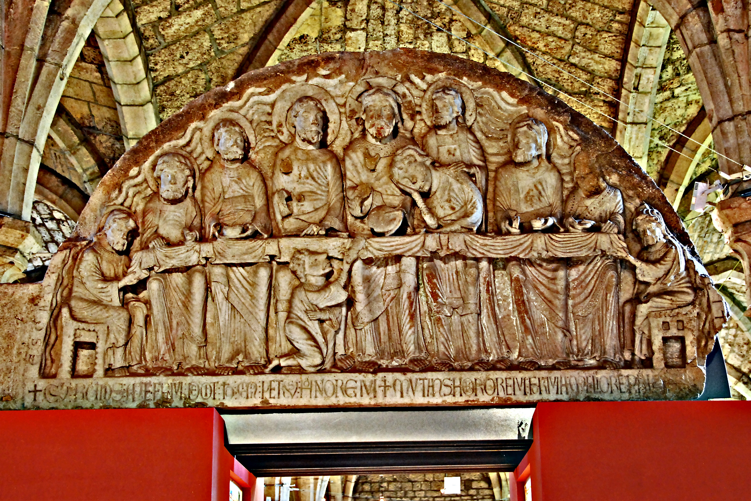 St-Bénigne,Kunstmuseum, Tympanon, Abendmahl